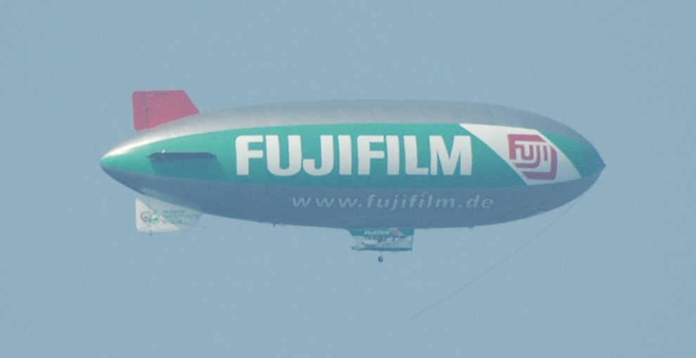 Zeppelin der WDL